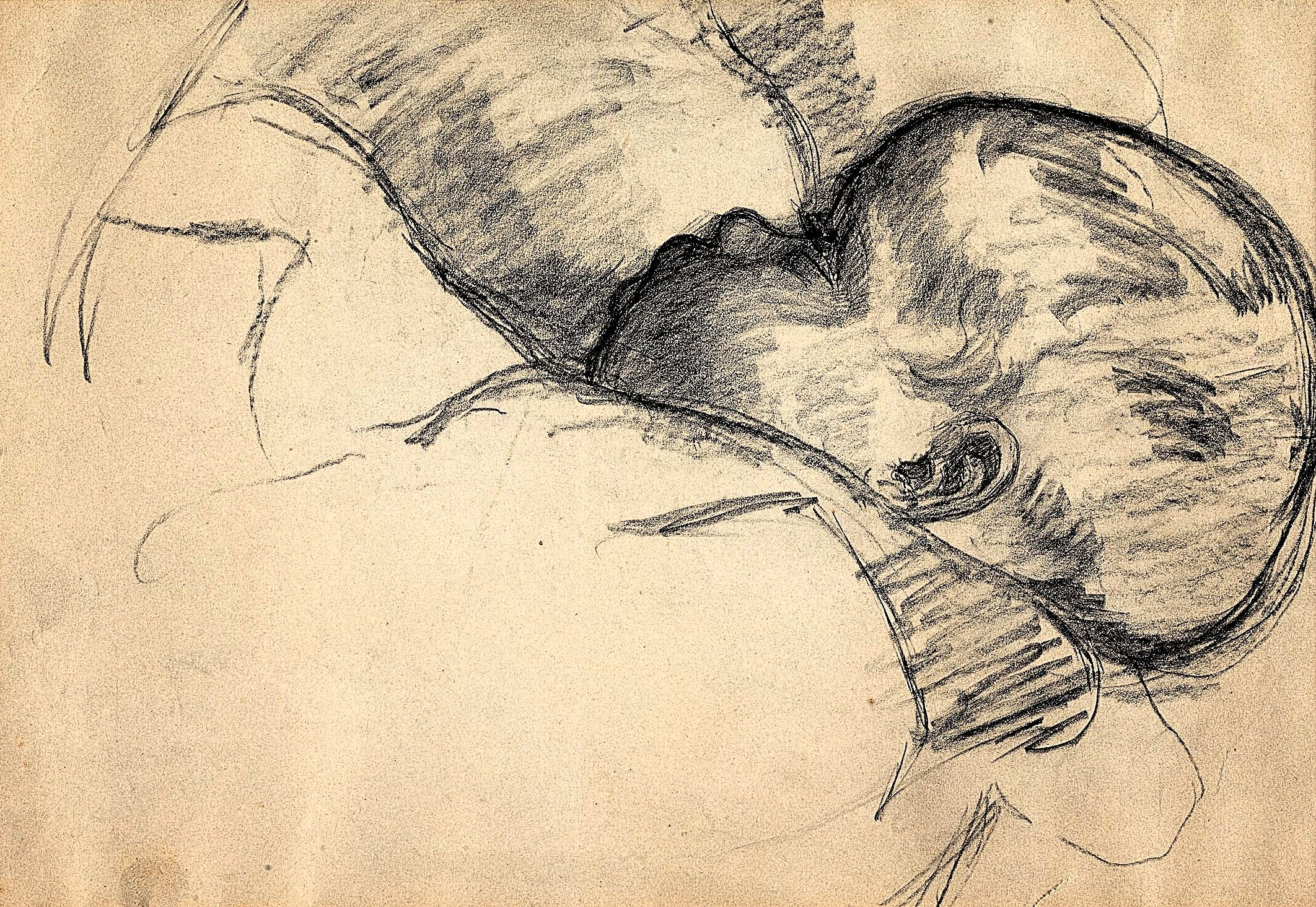 Étude de bébé. le dessin de Jean-Baptiste-Armand Guillaumin.